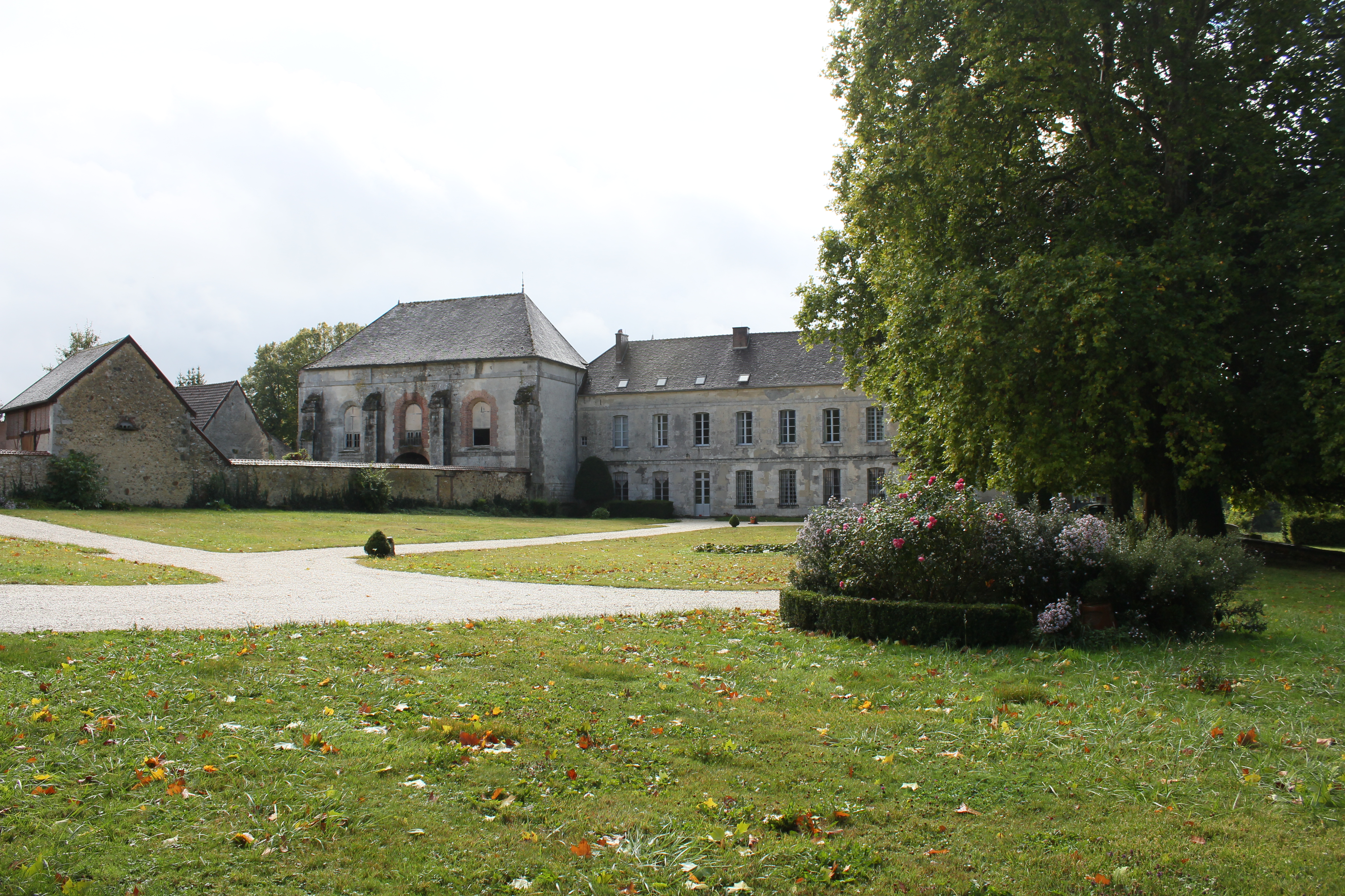 Abbaye Notre-Dame du Reclus, (InscritClassé, 19681980)